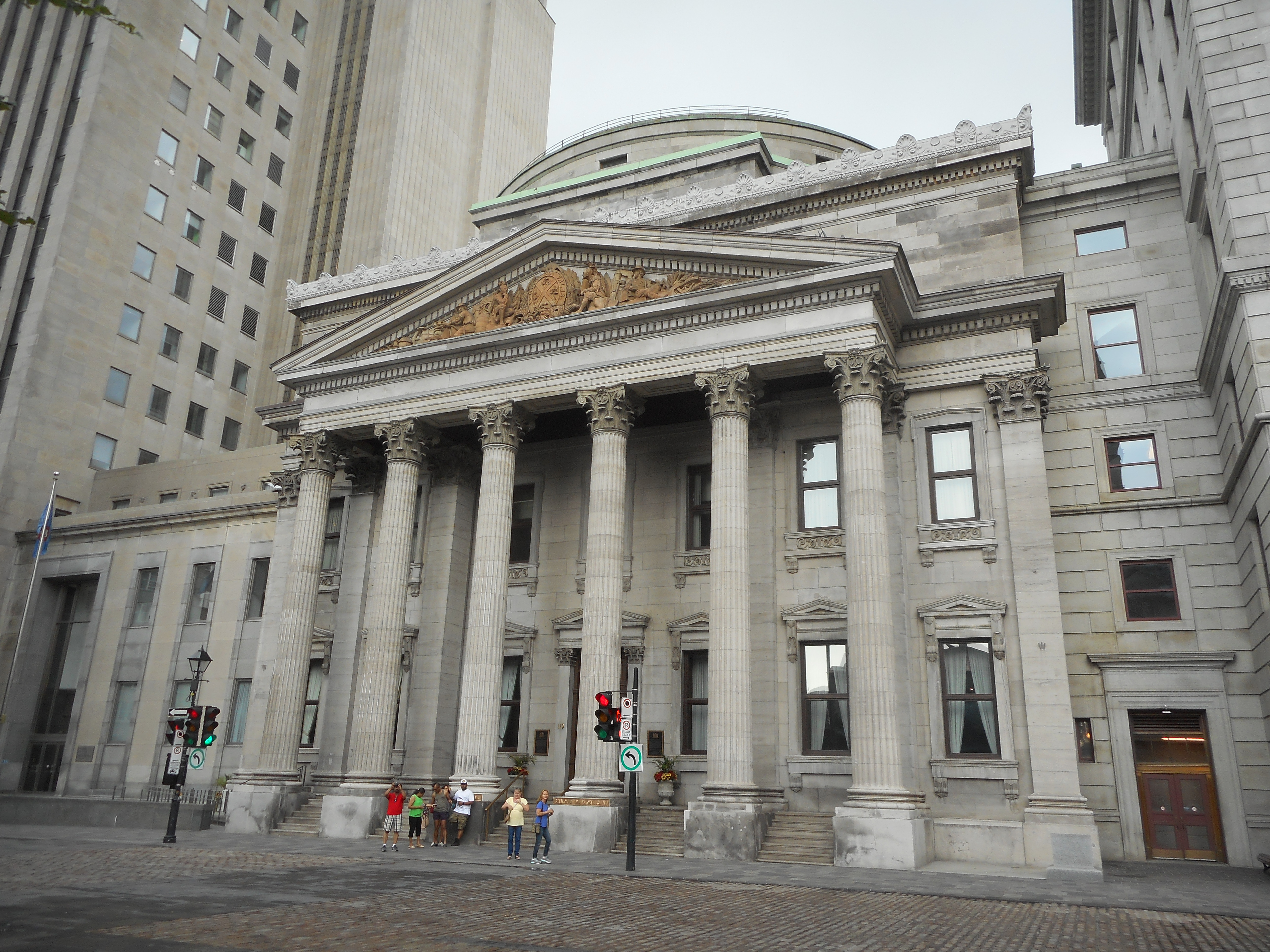 Banque de Montréal, au 119, rue Saint-Jacques à Montréal. Construit en 1845 sur des plans de John Wells.